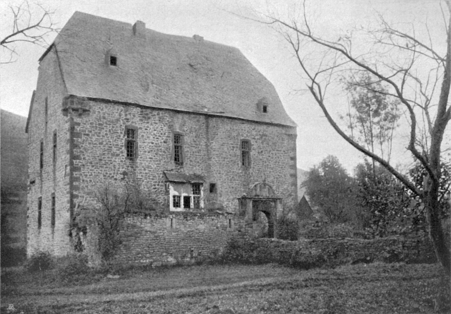 Foto des Burghauses der Burg Gödersheim in Nideggen-Wollersheim